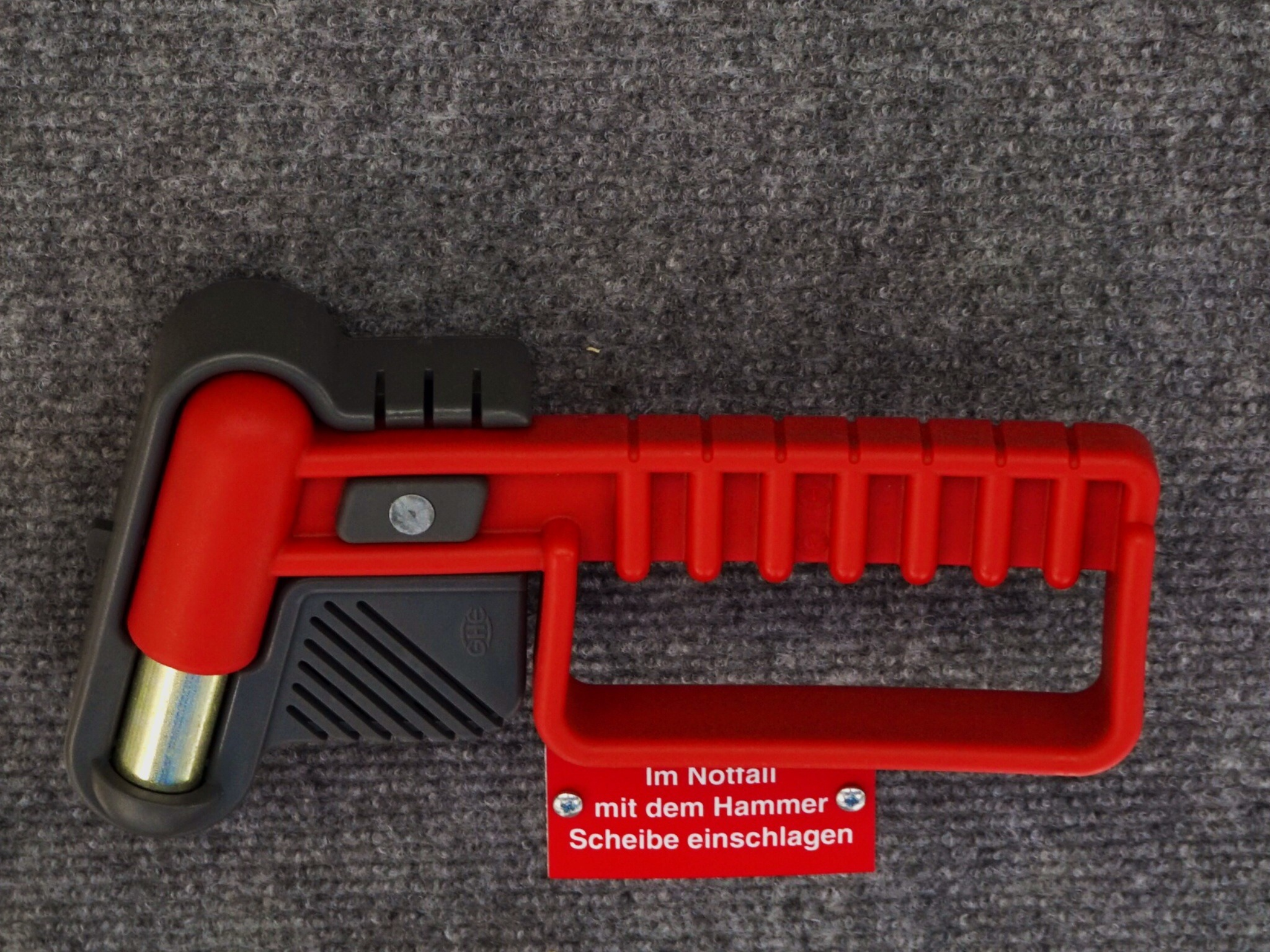 Notfallhammer